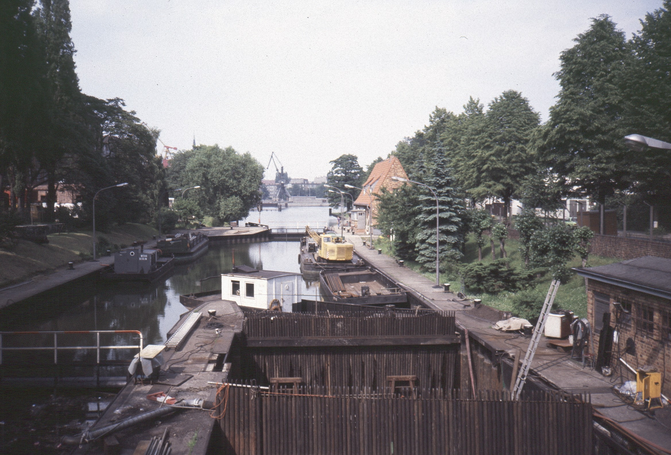 Oberschleuse Landwehrkanal Berlin